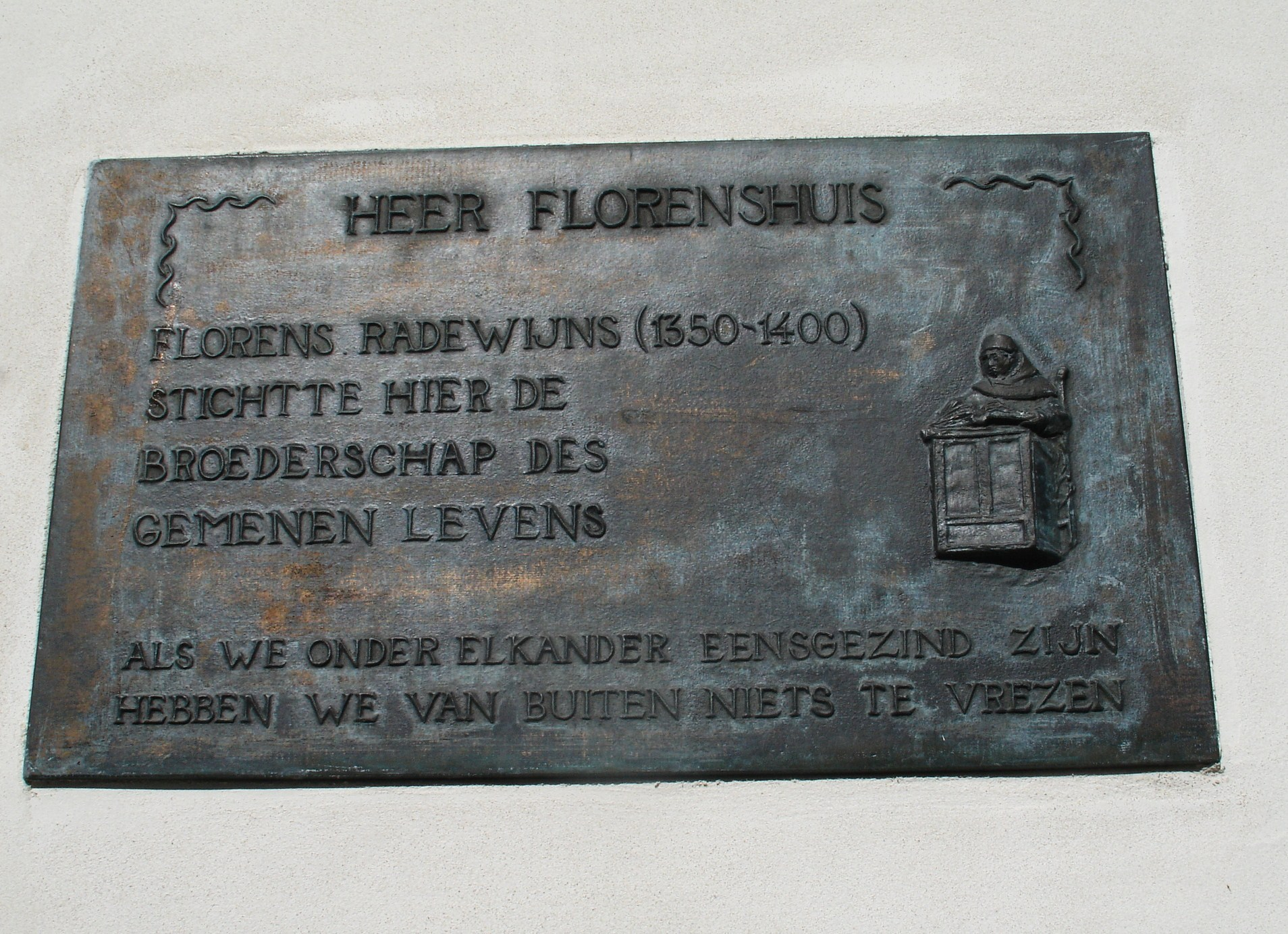 Plaquette op het Heer Florenshuis van Florens Radewijns aan de Engestraat in Deventer.